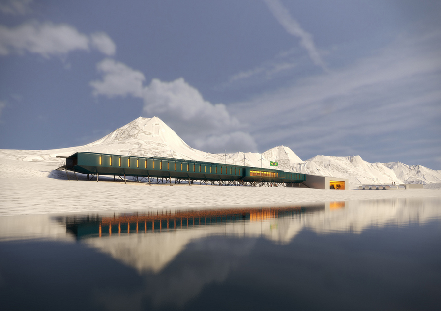 21/07/2014, Brasília - DF Fotos: Divulgação Marinha do Brasil